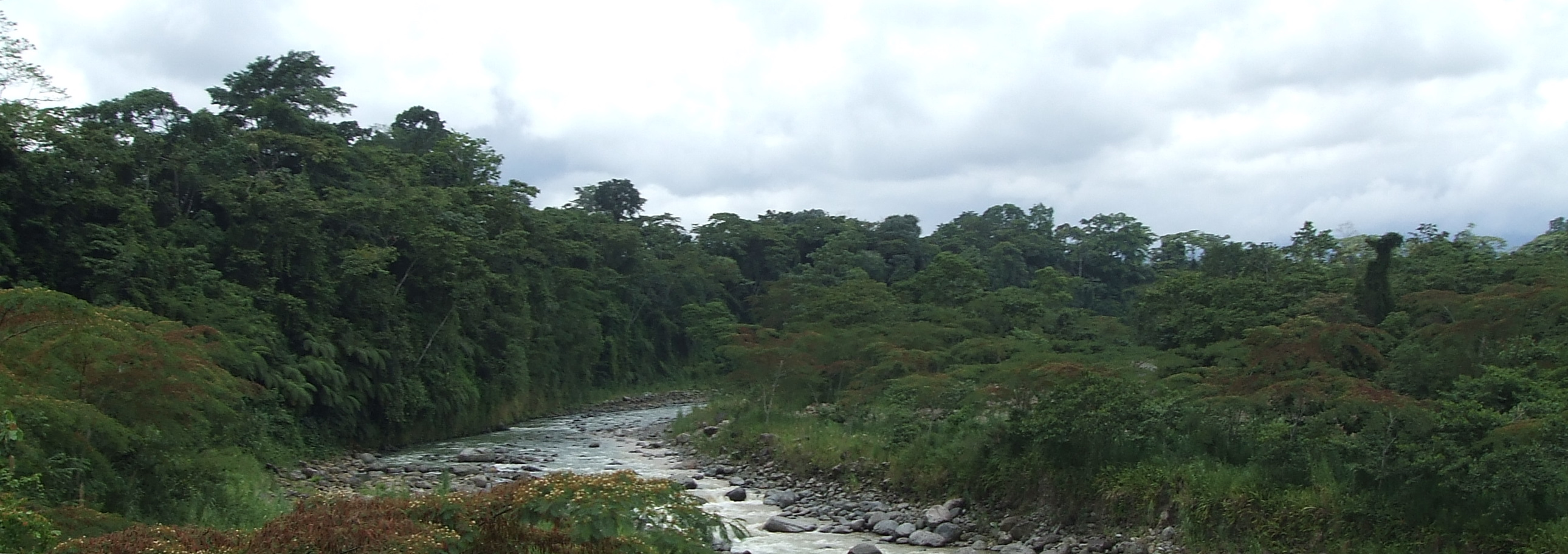 El río Toro Amarillo es un río de la vertiente del Caribe de Costa Rica, que atraviesa el cantón de Pococí, en la provincia de Limón y desemboca en el río Sucio.